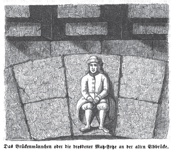 Vom Brückenmännchen zu Dresden. In: Deutsche Städtewahrzeichen: ihre Entstehung, Geschichte und Deutung. Leipzig: Weber, 1858